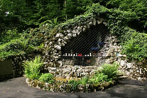 Grotte (Maria) zwischen Wahlen und Grindel